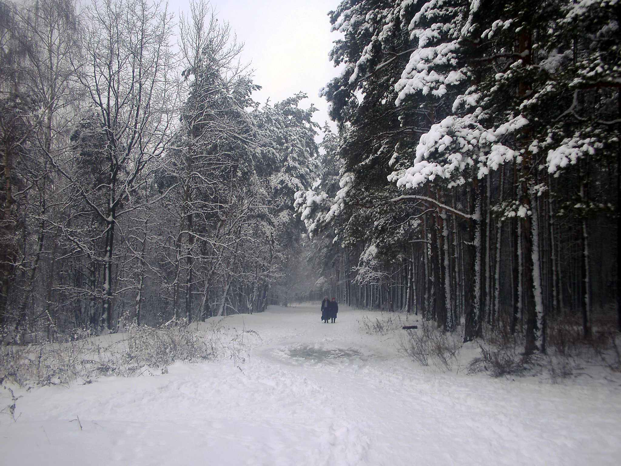 Wald von Biķernieki